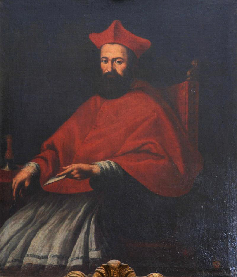 Niccolò Ridolfi, cardinale (Pier Simone Vannetti, 1723, Prato, Italia)